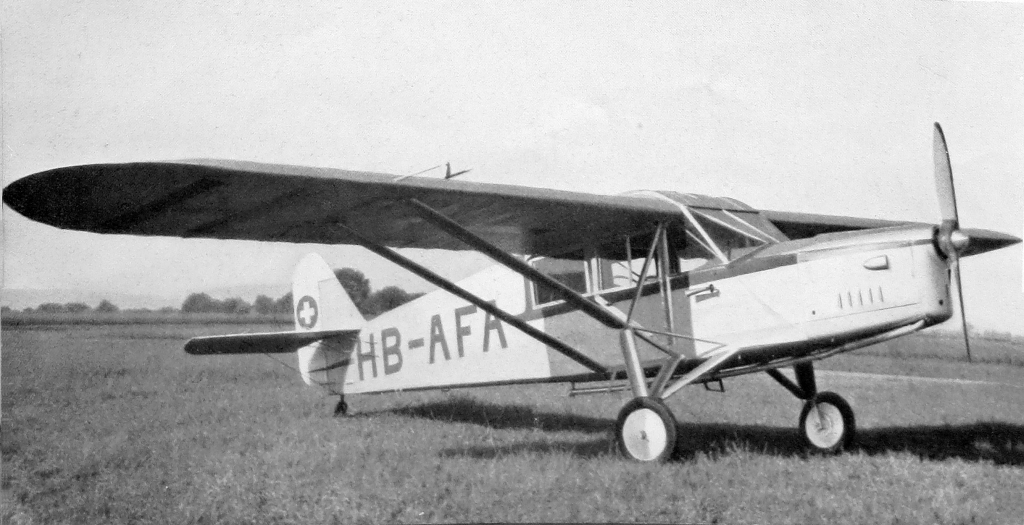 letecký motor Walter Major 4 a letoun FARNER WF 21 (1936)